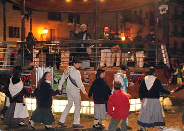 Santa Ageda festival in Altsasu, Navarre.